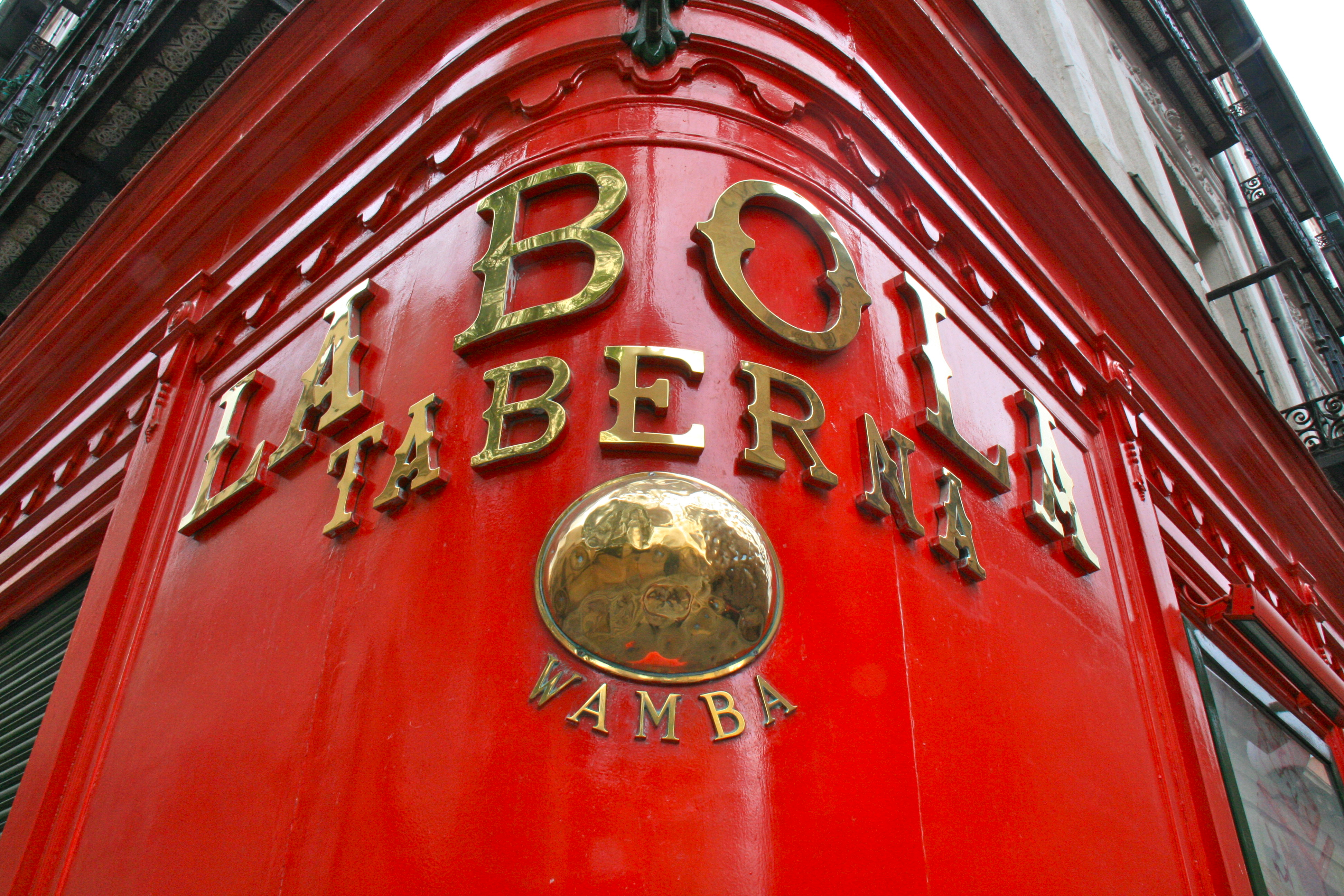 La Bola - Madrid - Wamba